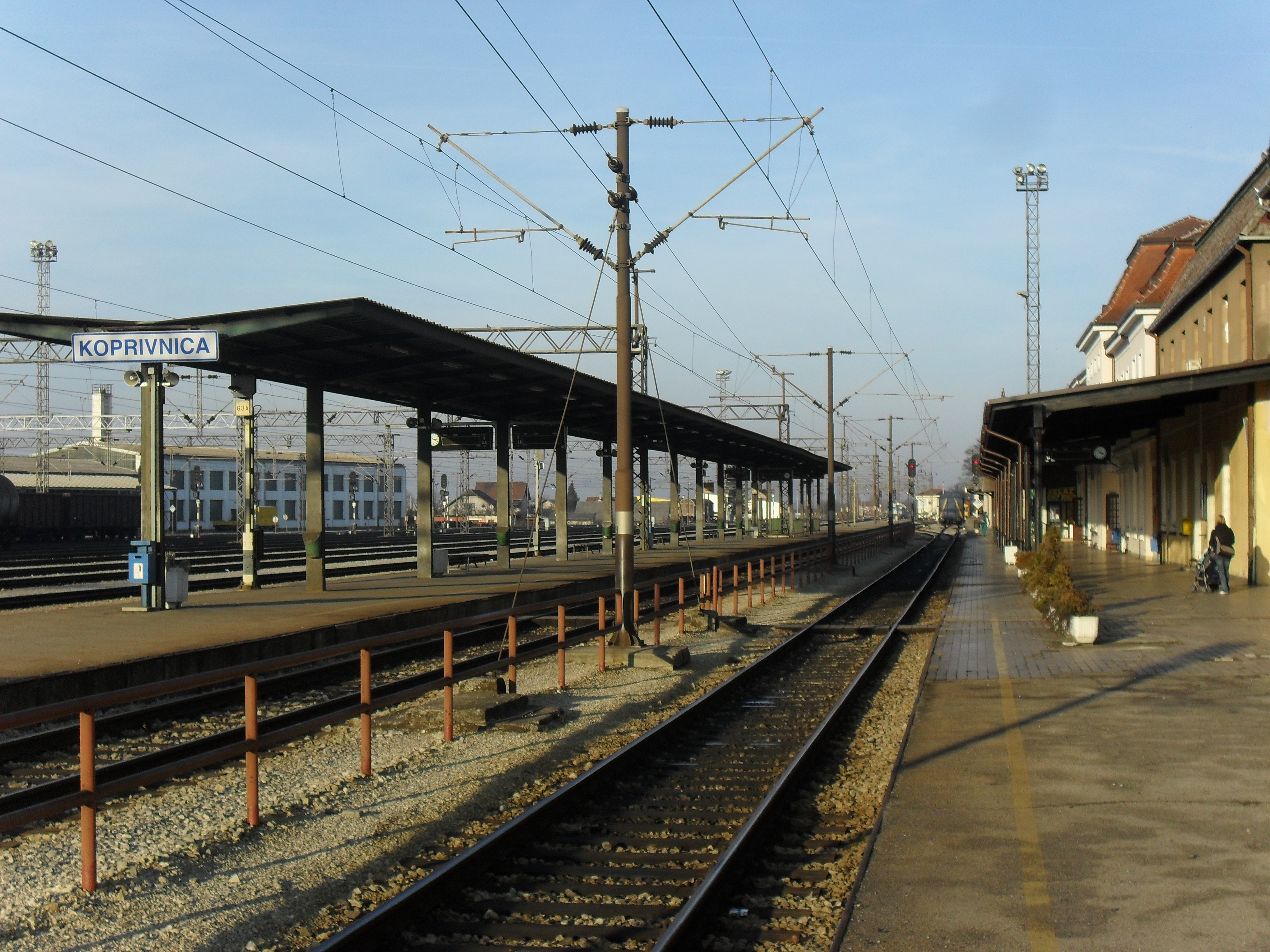 kolodvor